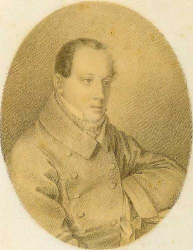 Портрет П. Я. Чаадаева. Художник И.Е.Вивьен. 1820-е гг. Государственный исторический музей